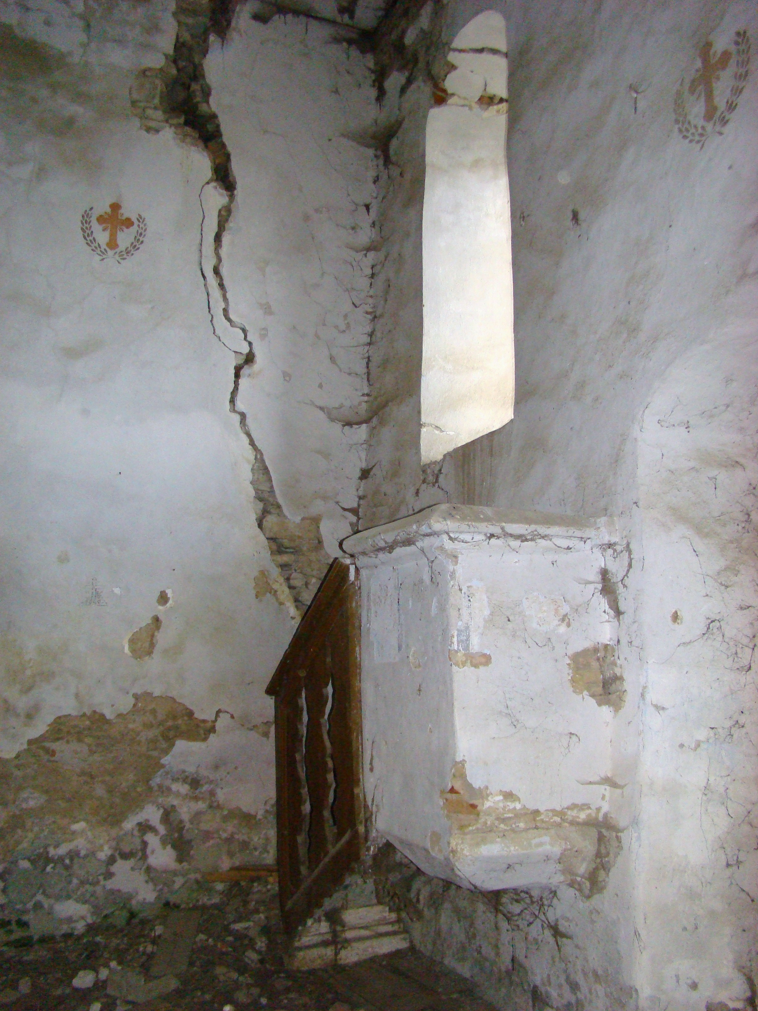 Ansamblul bisericii evanghelice, sat CORVINEŞTI; comuna MATEI